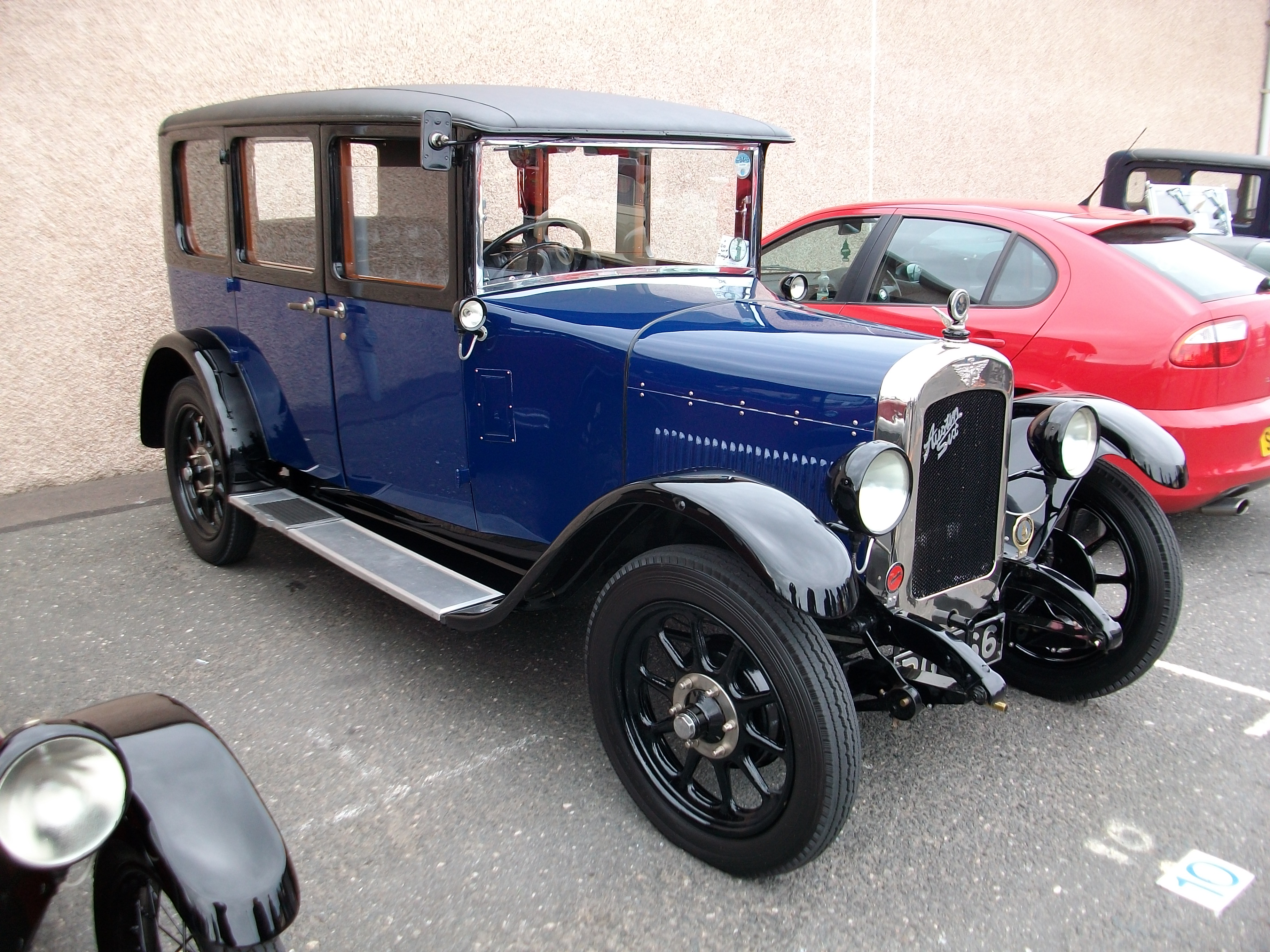 1929 Austin 16 Burnham